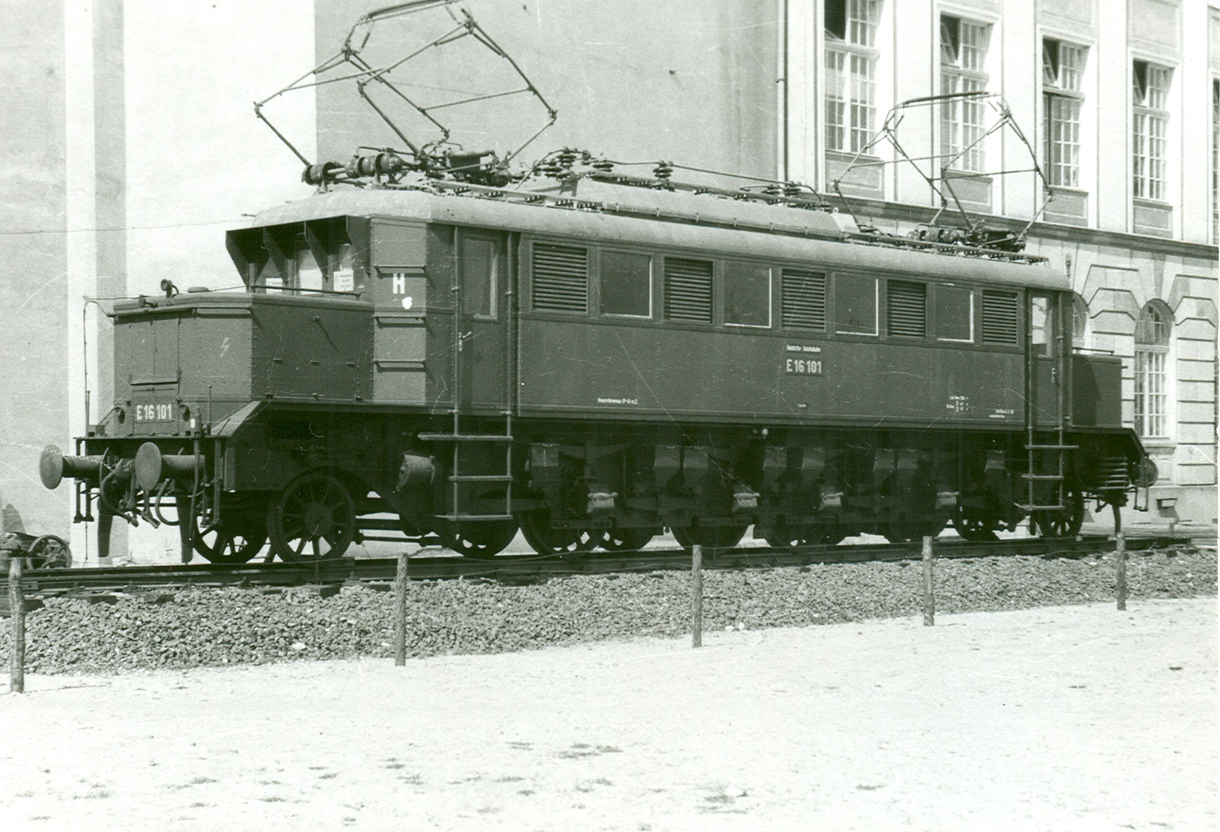 E 16 101 1959 vor dem Seminargegäude der Hochschule für Verkehrstechnik